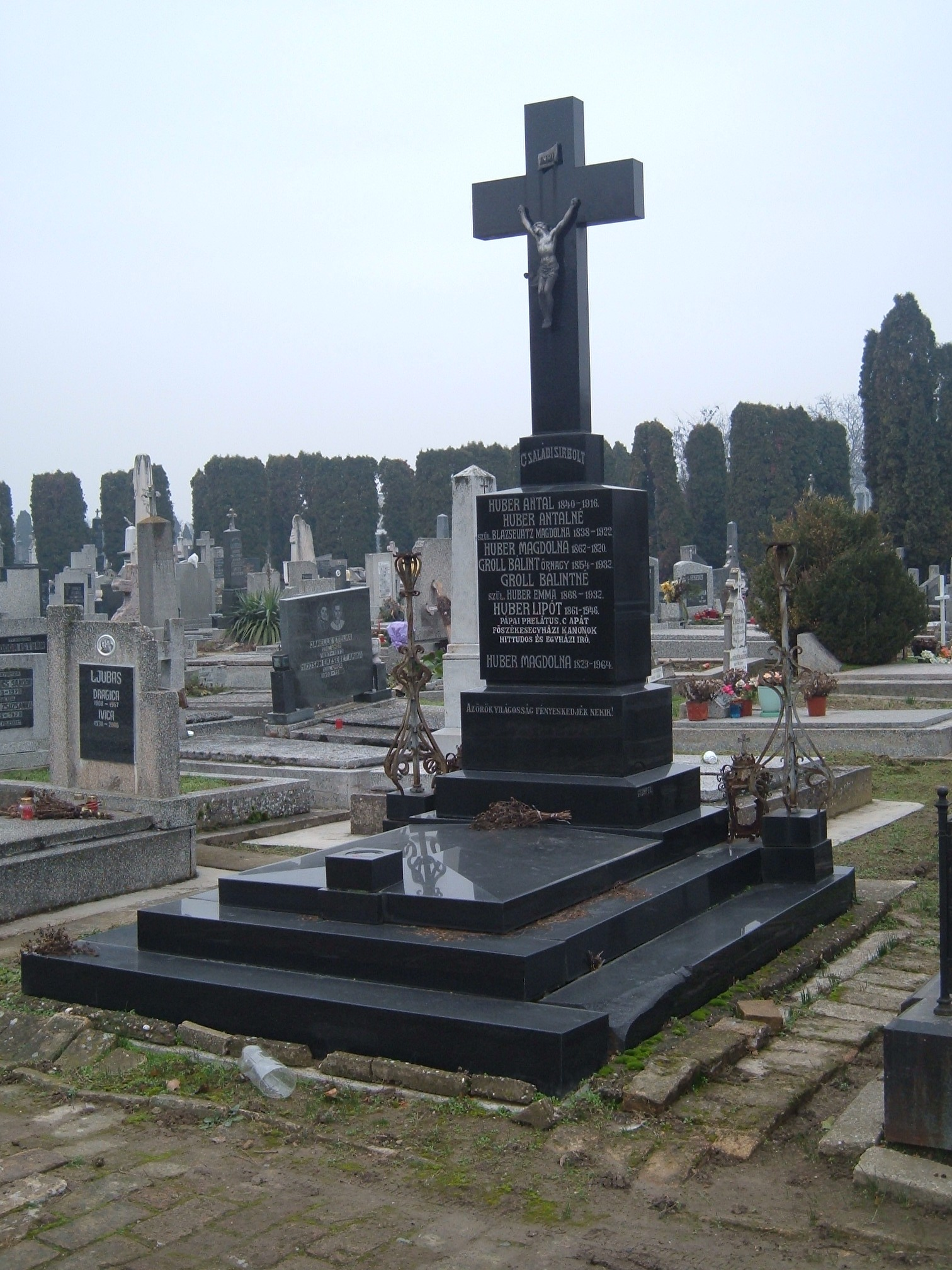 Huber Lípót sírja a Szent Rókus temetőben (Zombor)